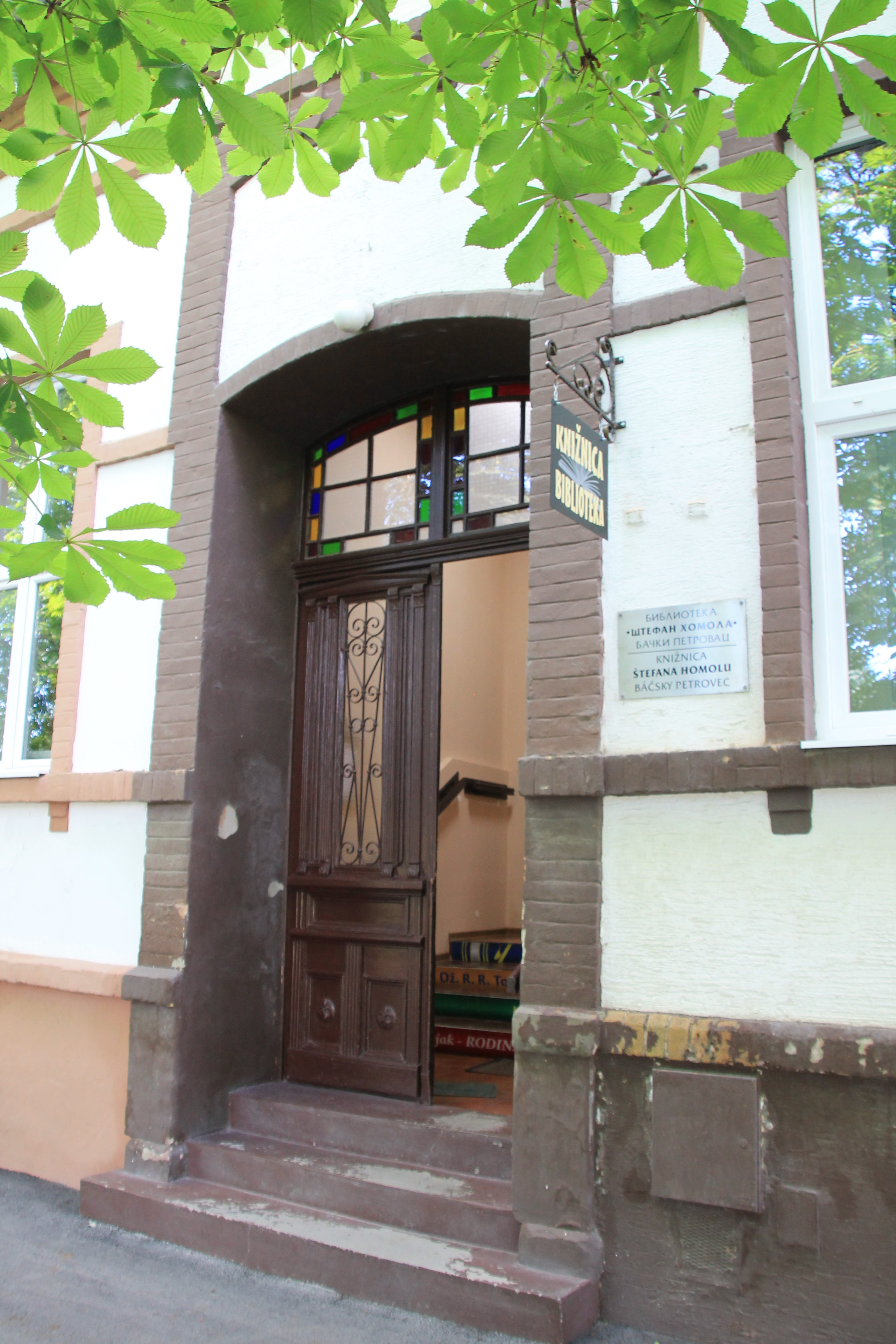 Bački Petrovac